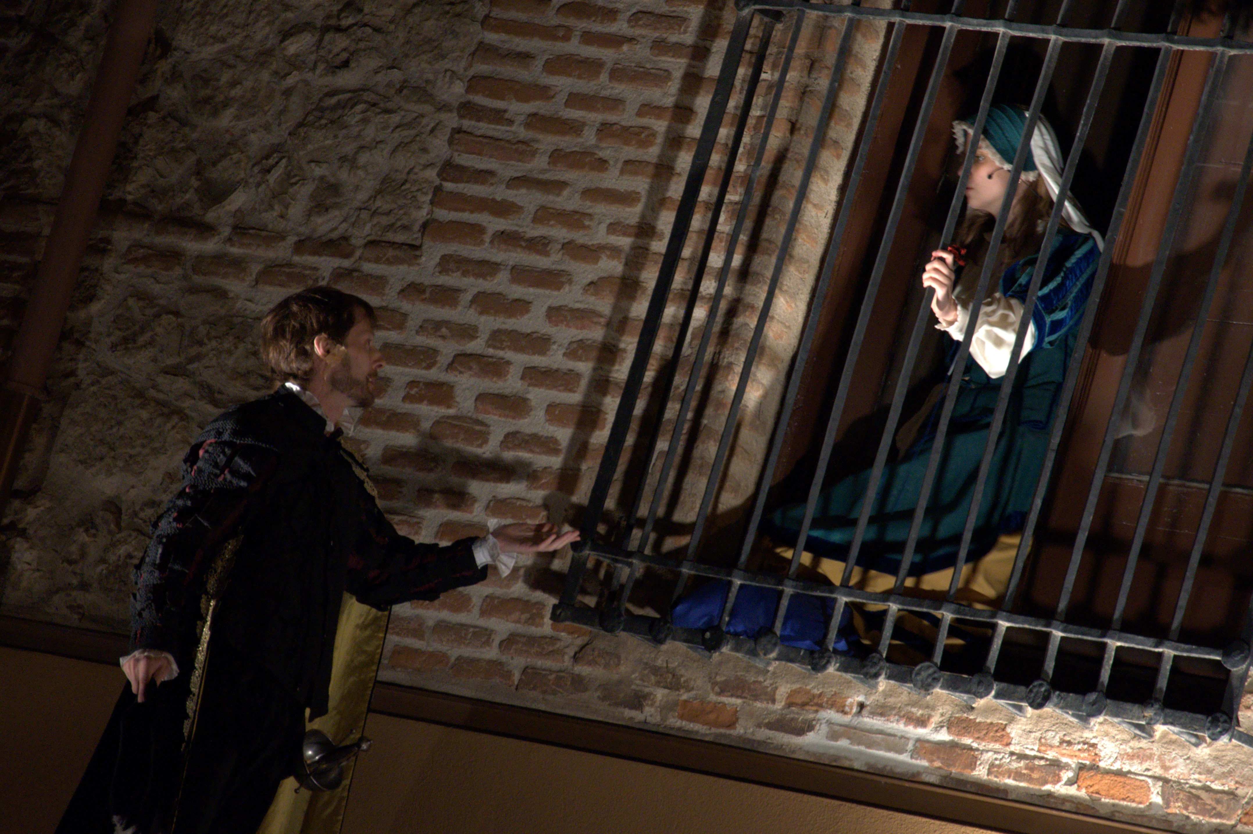 Tenorio Mendocino scene, Palacio de la Cotilla